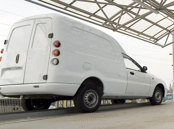 Осмотр автомобилей ZAZ-Sens на эстакаде в цеха сдачи Запорожского Автомобилестроительного Завода. Собственное производство.